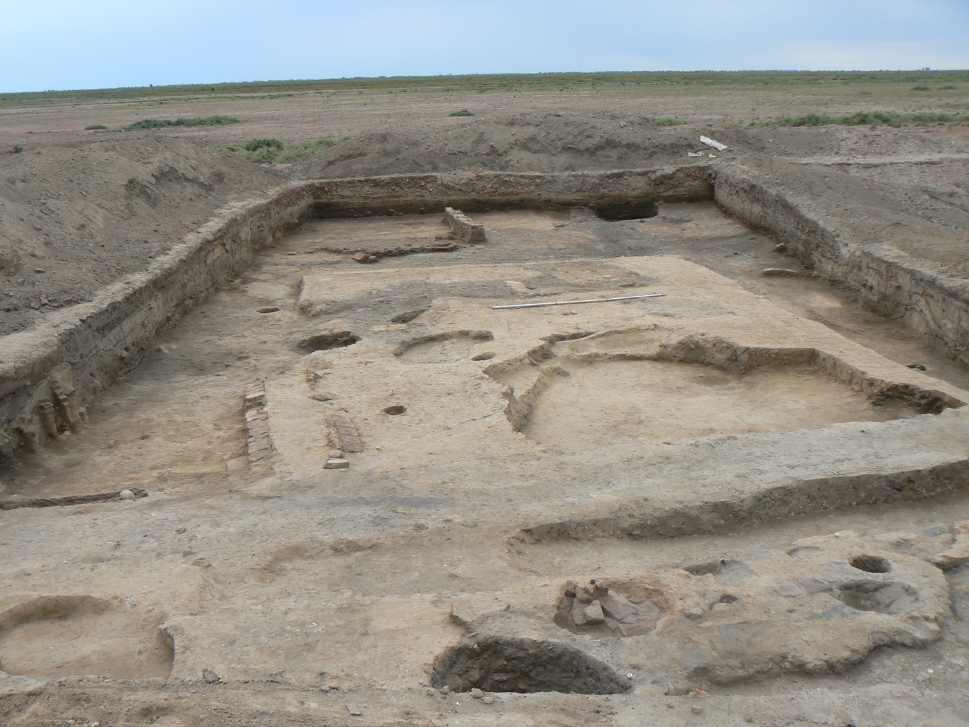 Самосдельское городище 2008 раскоп №2 вид с севера